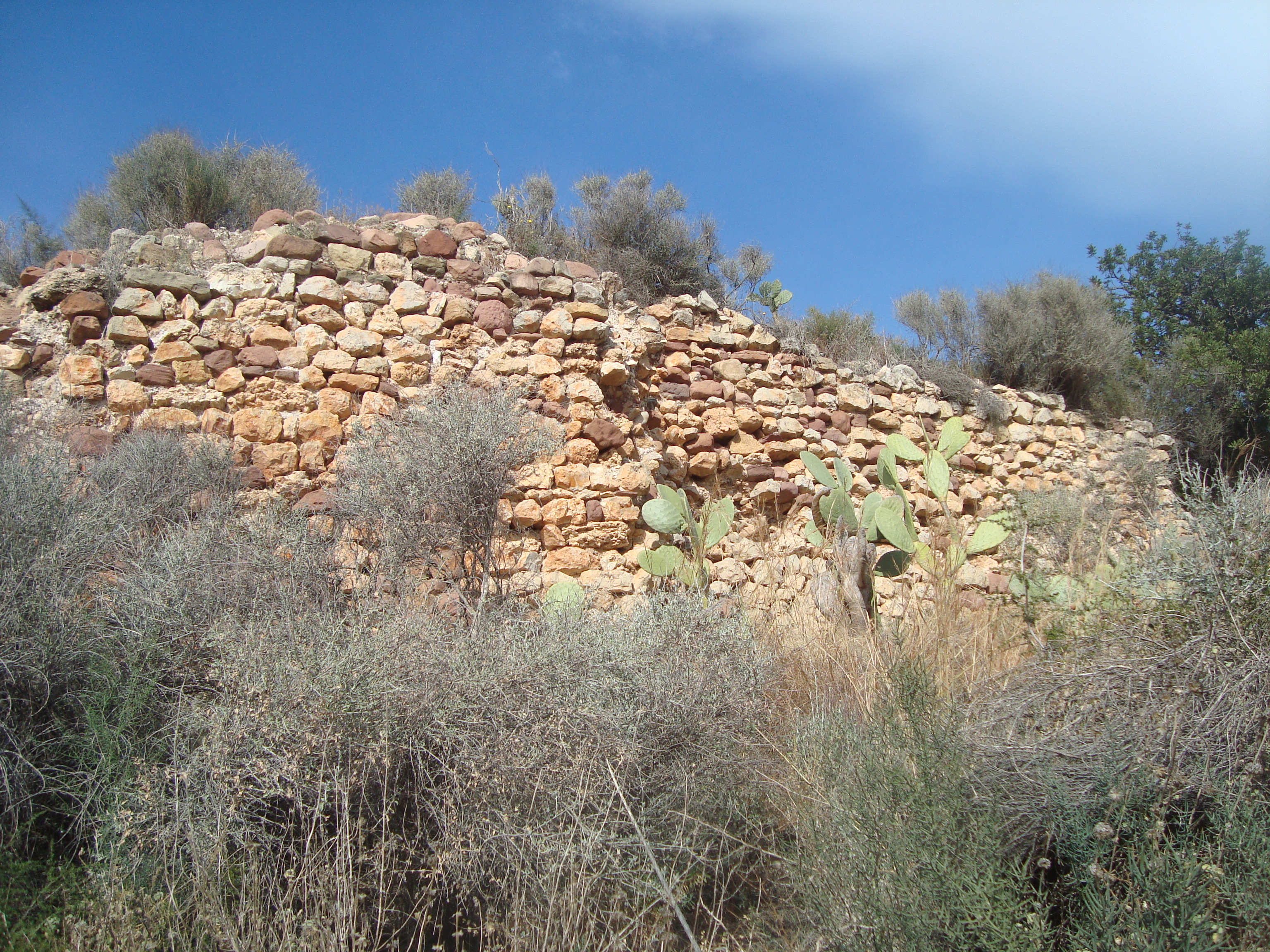 Castell de Benicàssim